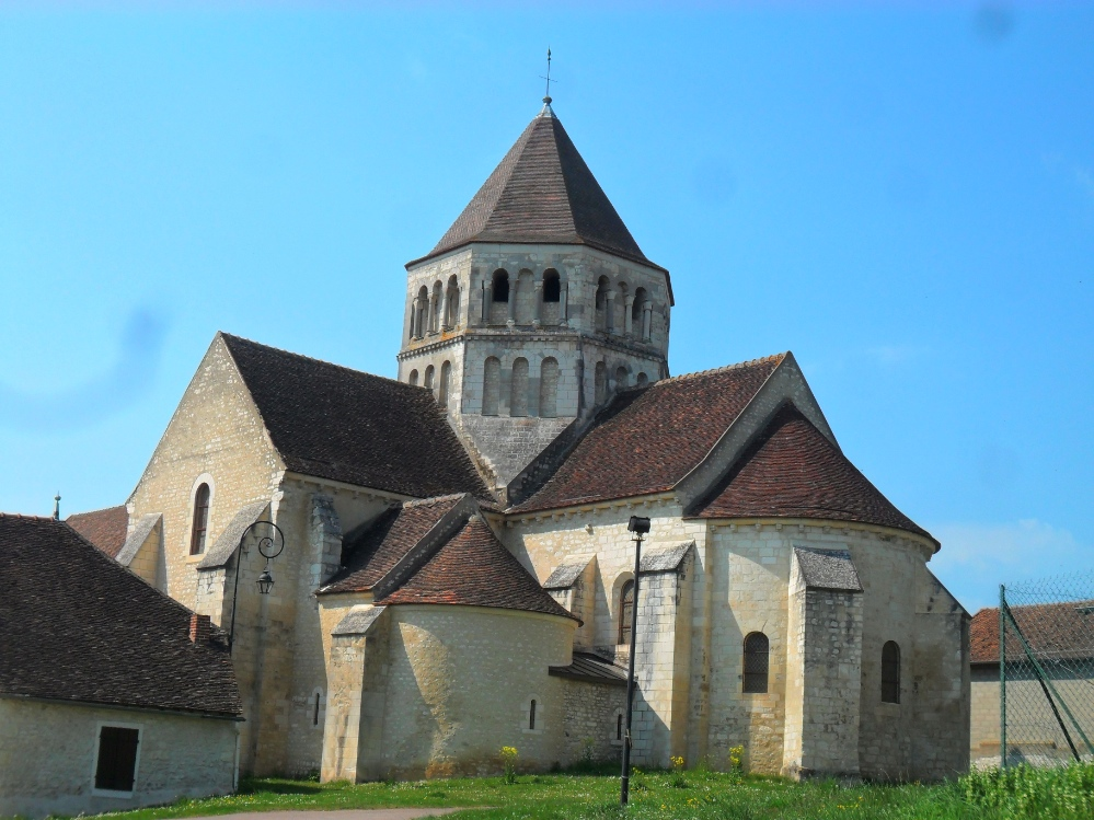 Eglise Larochoise.